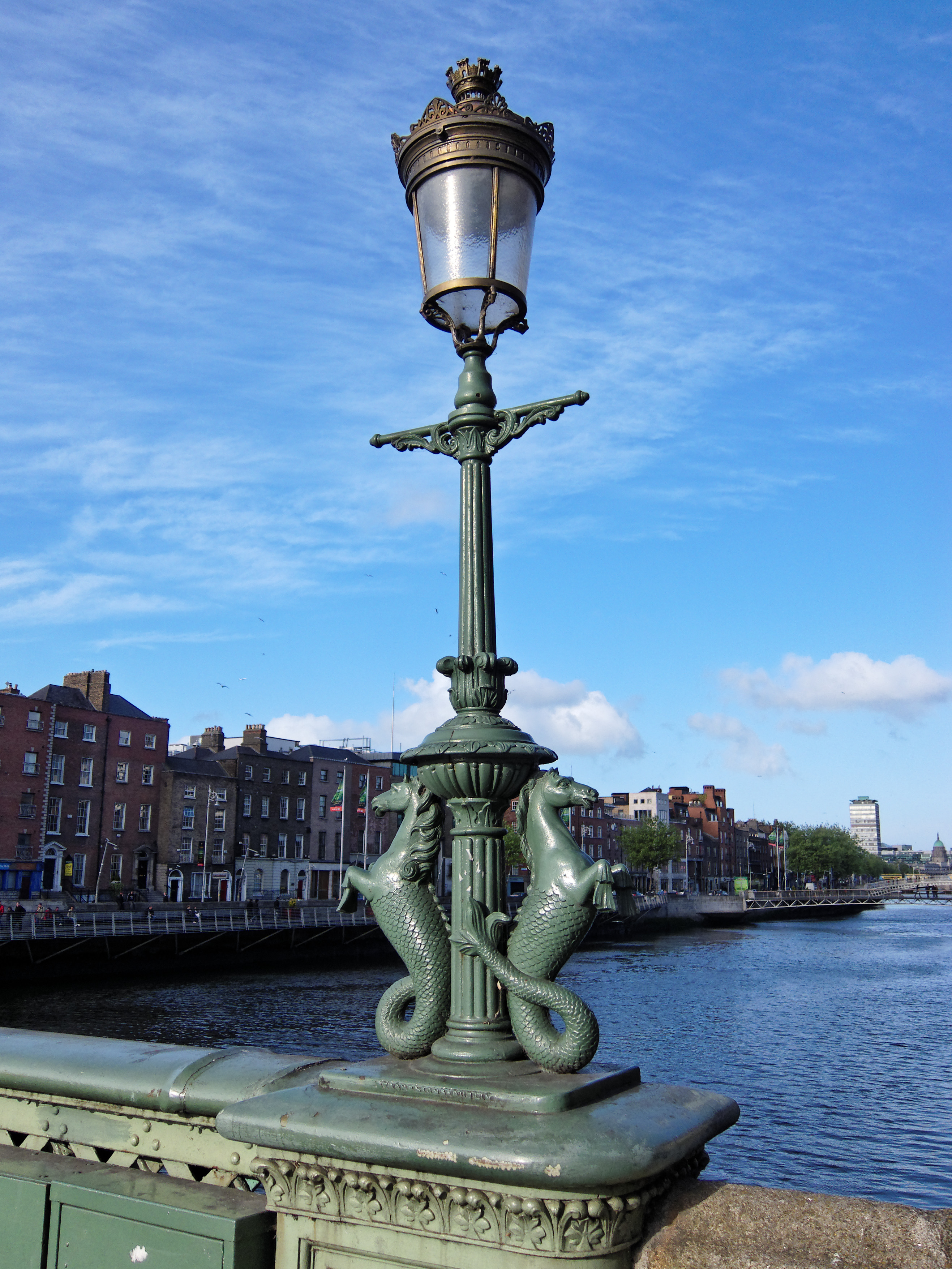 Luminaria dobre el puente Grattan. Dublín, Irlanda.